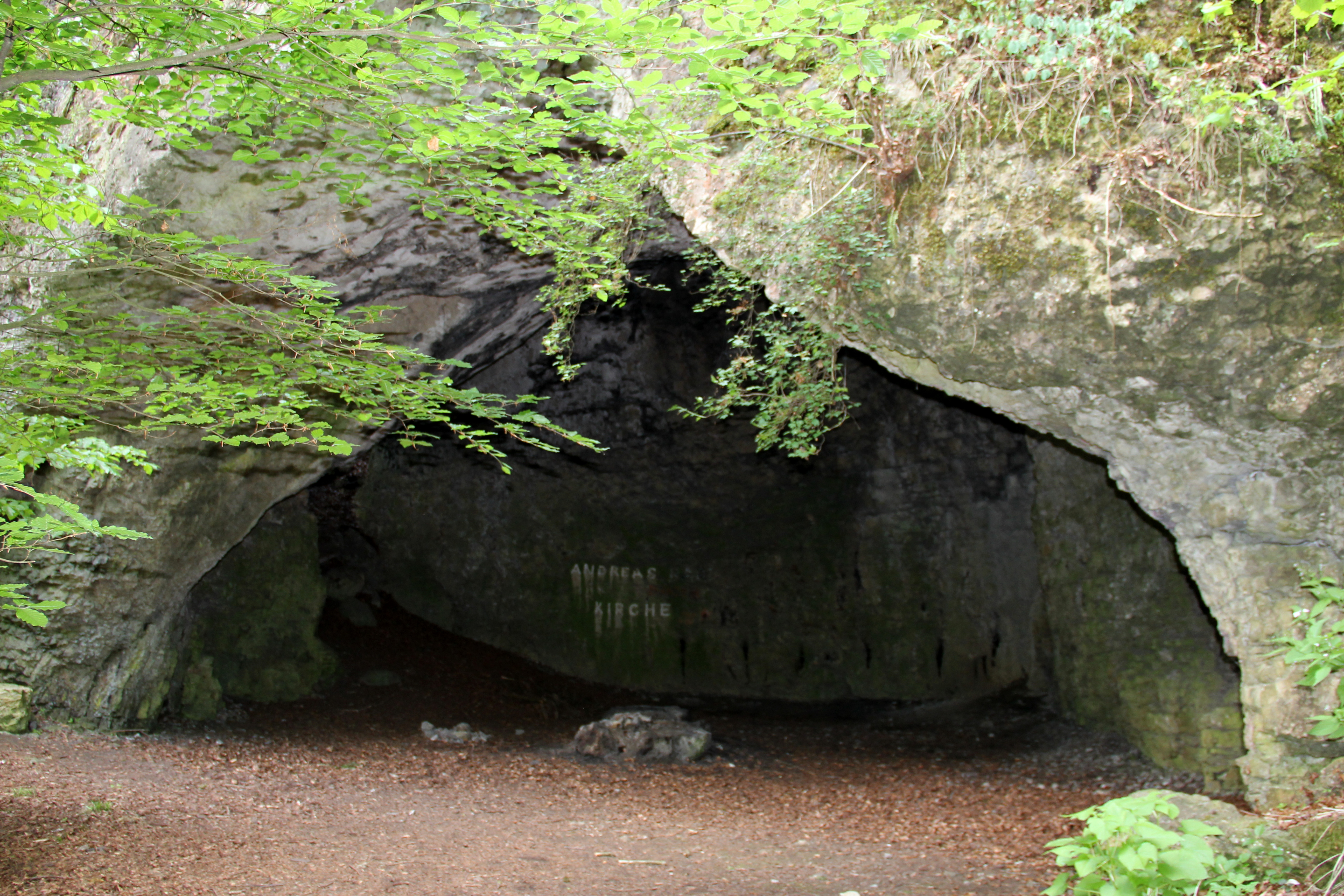 Andreaskirche, Eingang